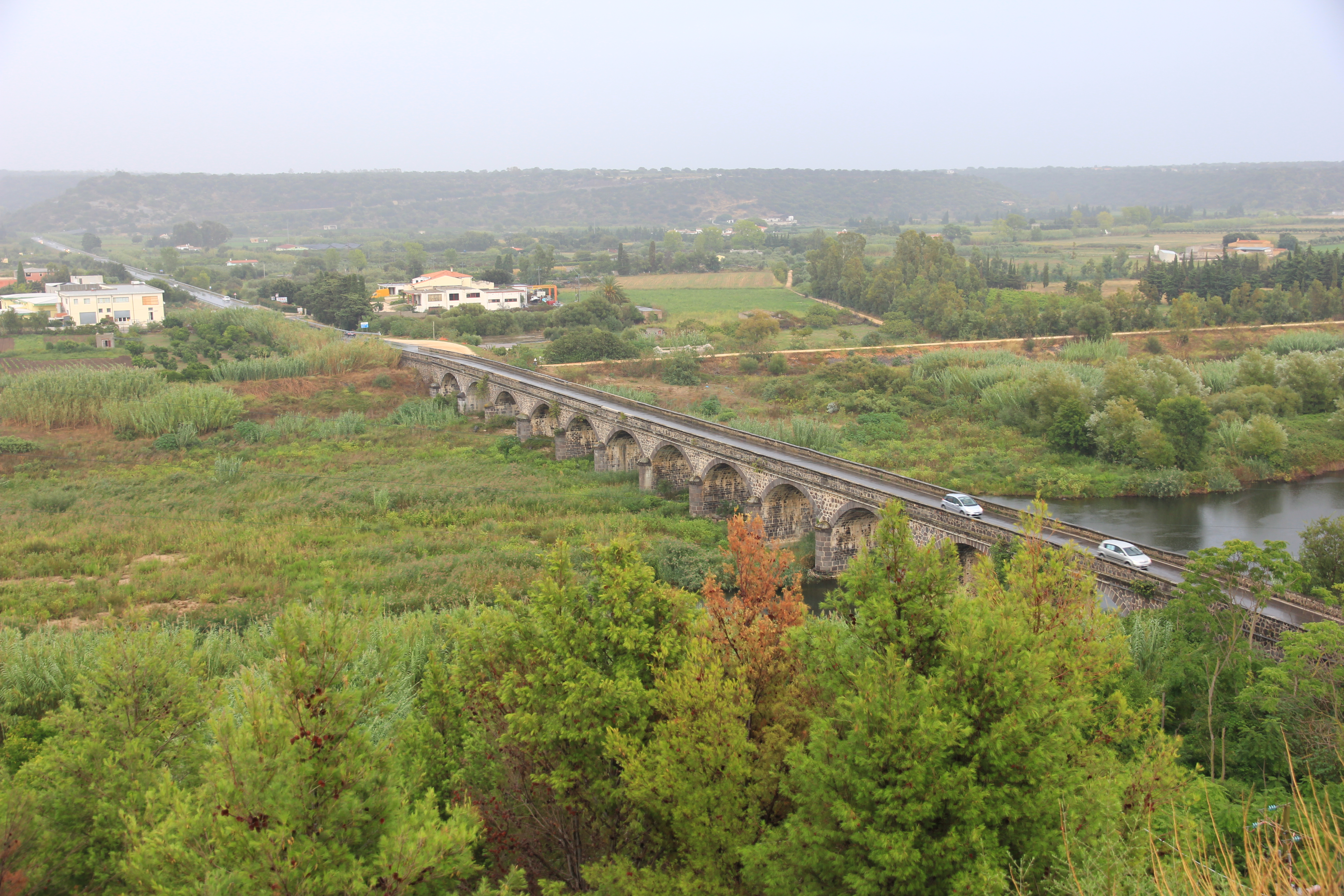 Orosei - Fiume Cedrino